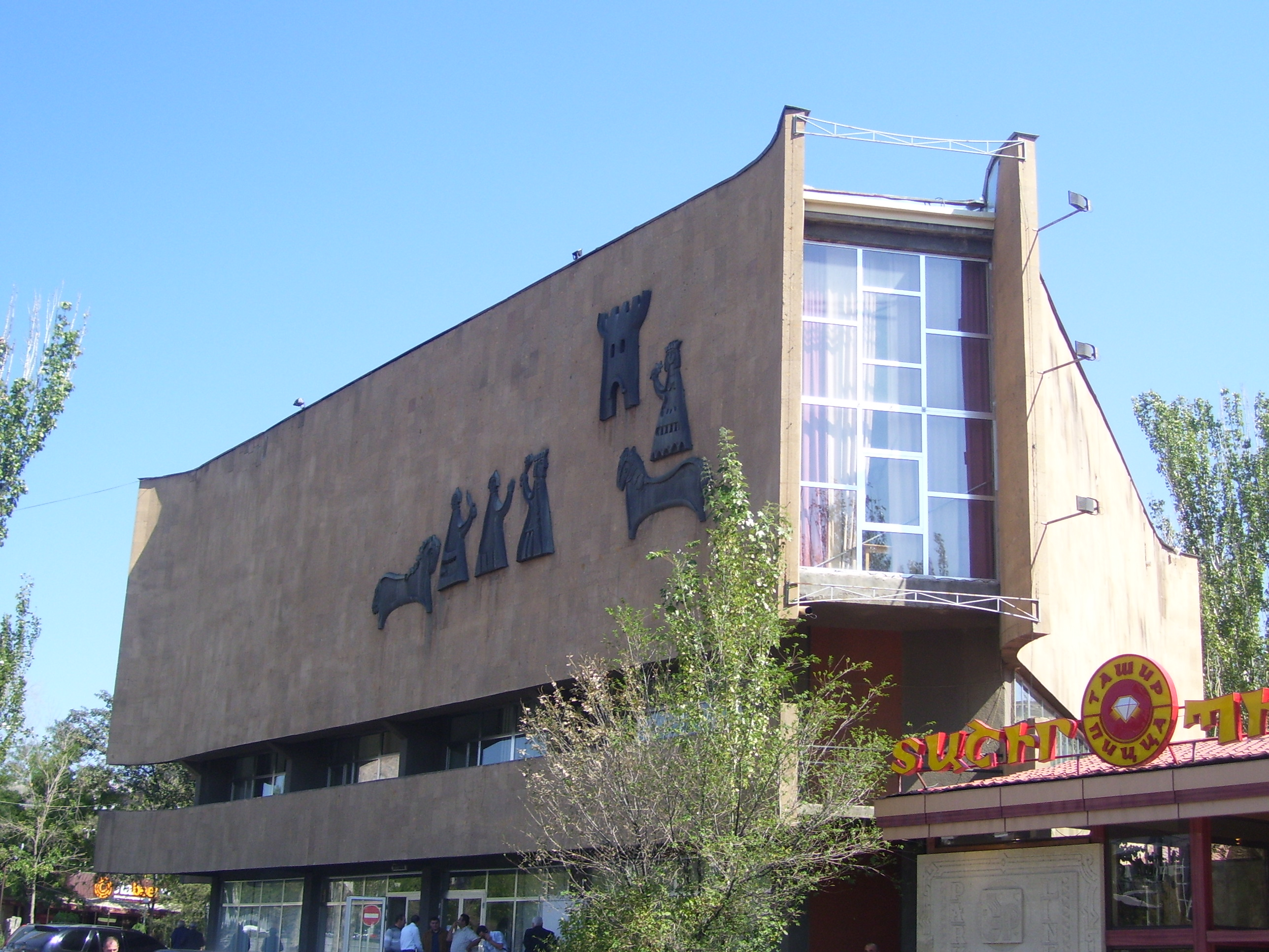 Տիգրան Պետրոսյանի անվան Շախմատիստի կենտրոնական տունը 1970 թ. Խանջյան փող. 50, Ճարտ.` Ժ. Մեշչերյակովա 6/151